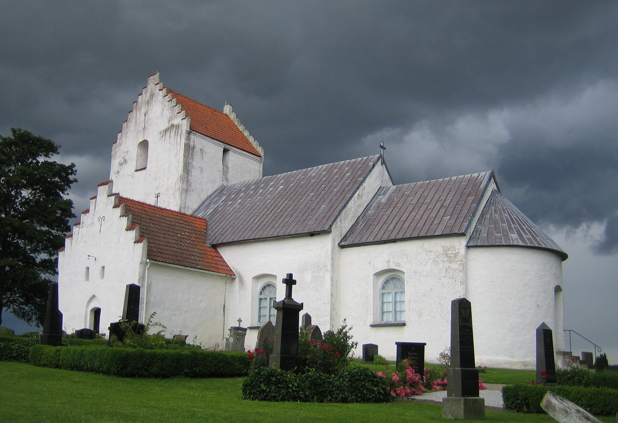 Ravlunda kyrka.